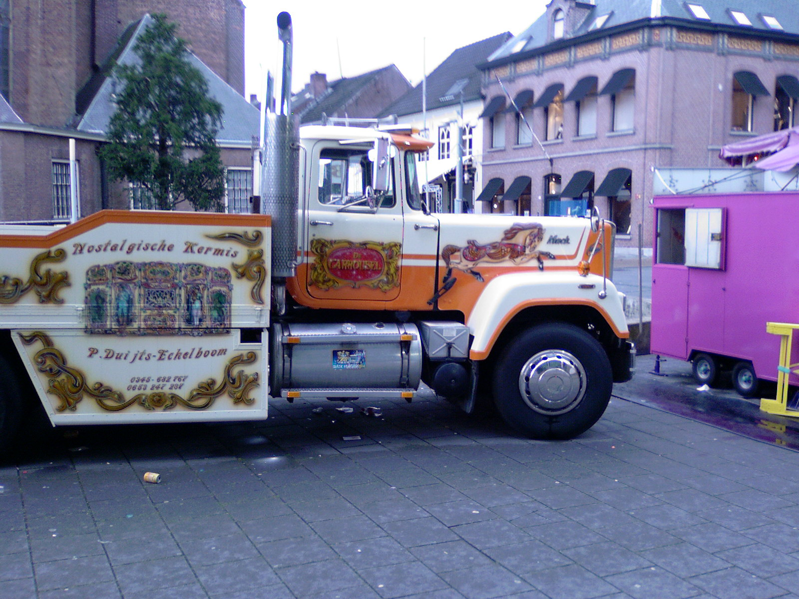 Mack gezien op de kermis in tilburg. Vrachtwagen word alleen gebruikt voor show doeleinde.